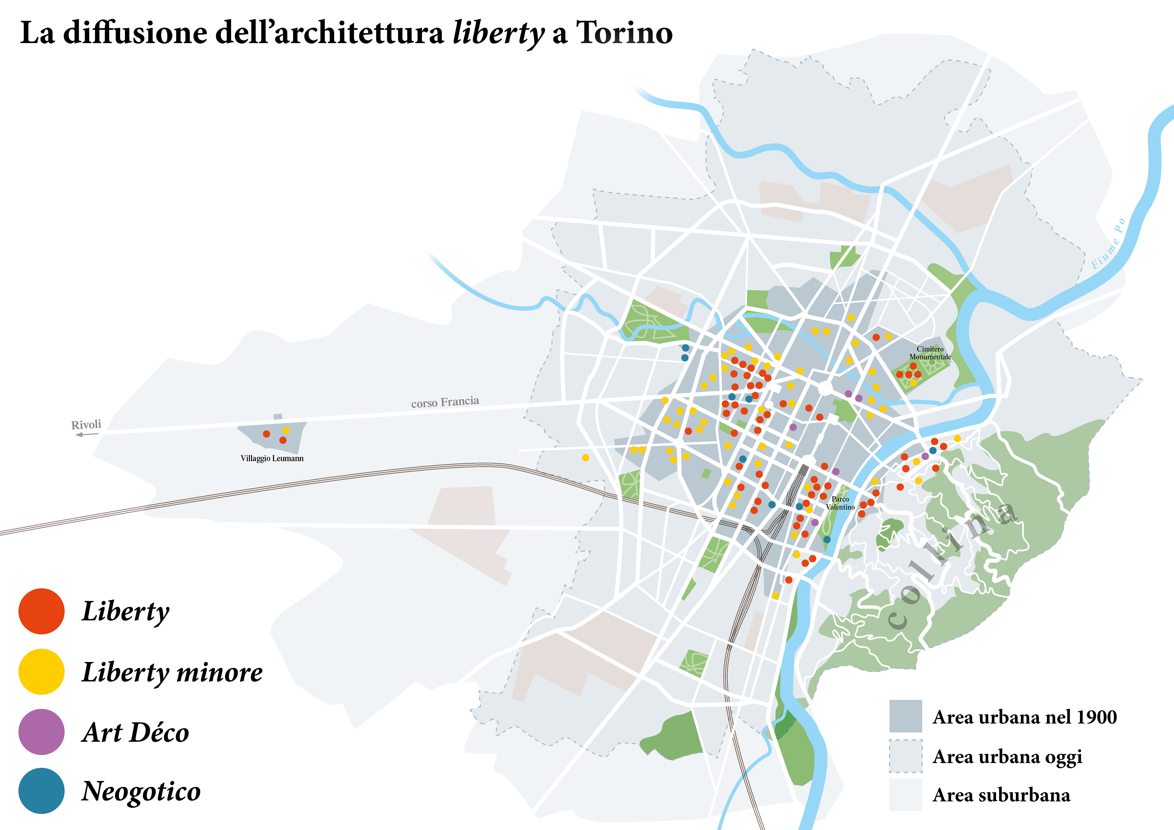 Mappa dell'architettura liberty a Torino